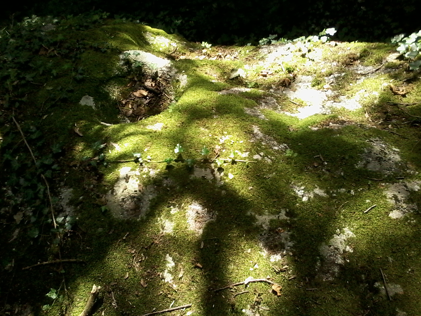 Ces pierres à cupules peuvent être observées non loin de la Tour de Montléans.